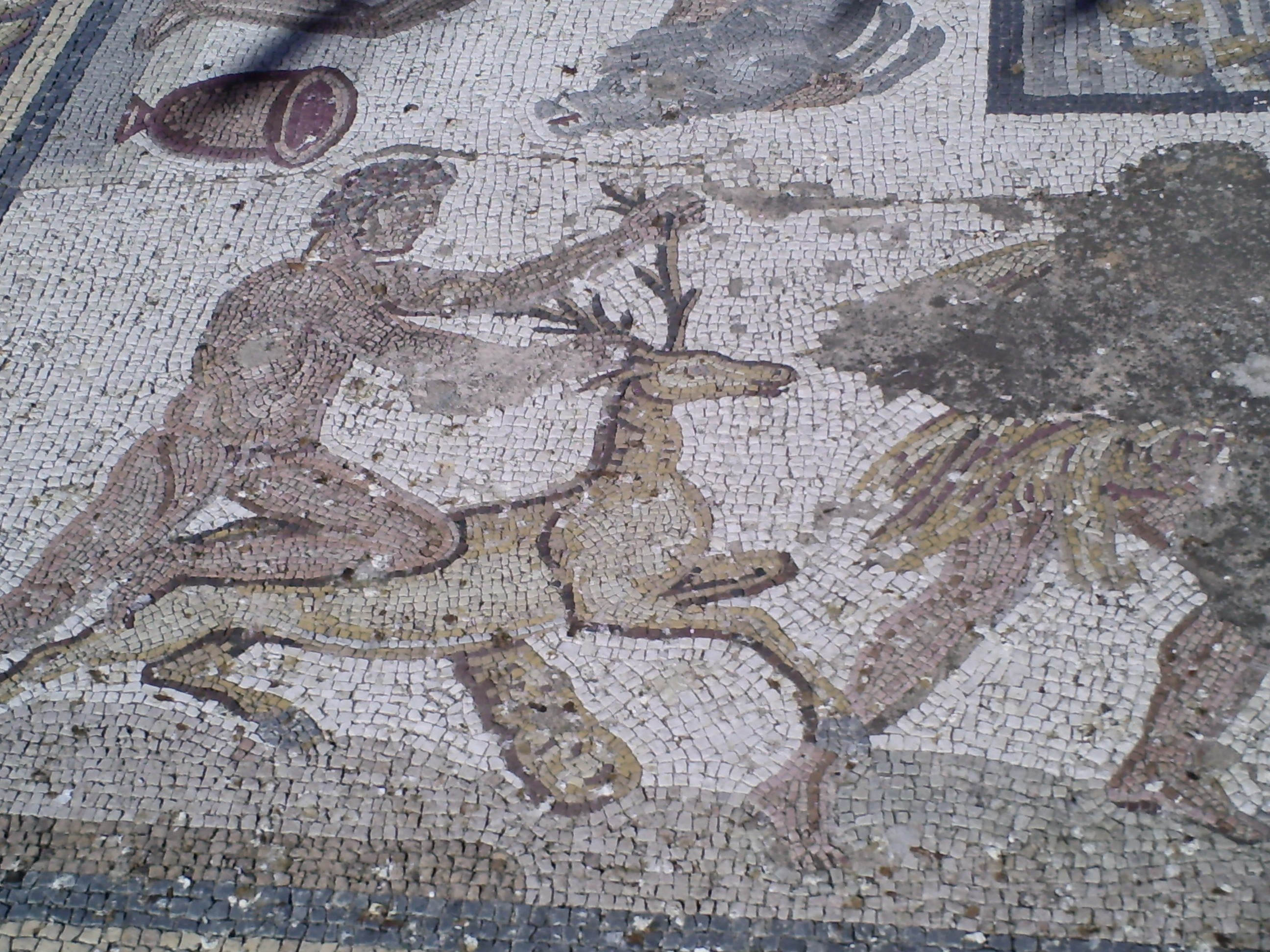 Fragment d'une mosaïque des travaux d'Héraklès (biche de Cérynie), IIIe s ap J.C. Musée archéologique de Paros